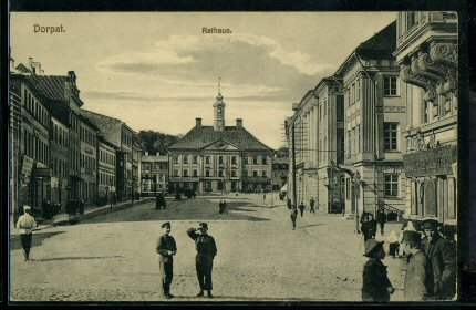 Tartu raekoda ja Raekoja plats, piltpostkaardil